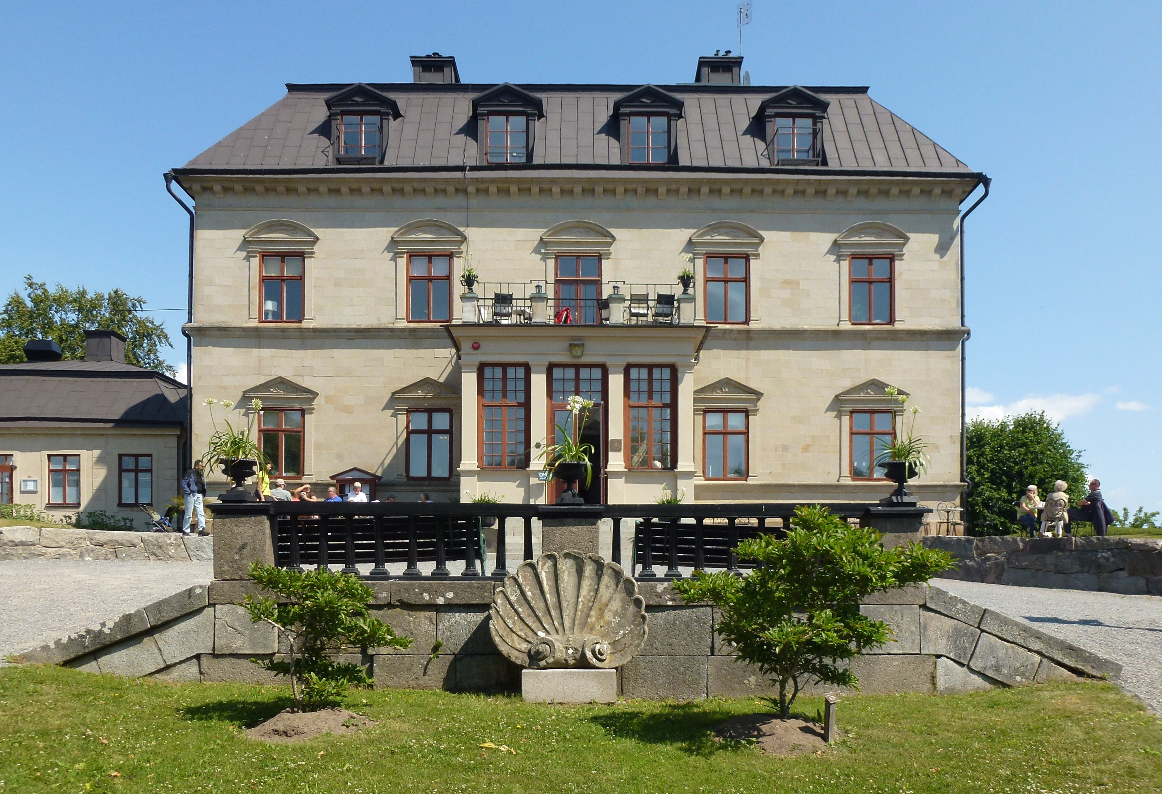 Görvälns slott fasad sydväst